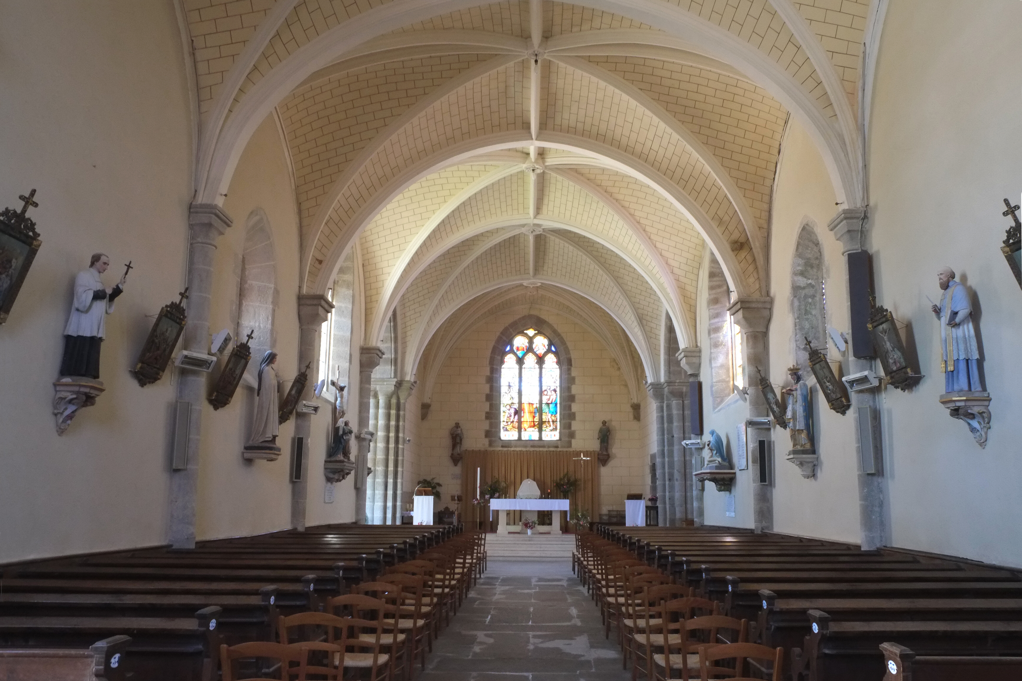 Nef de l'église Saint-Étienne Largeasse Deux-Sèvres France